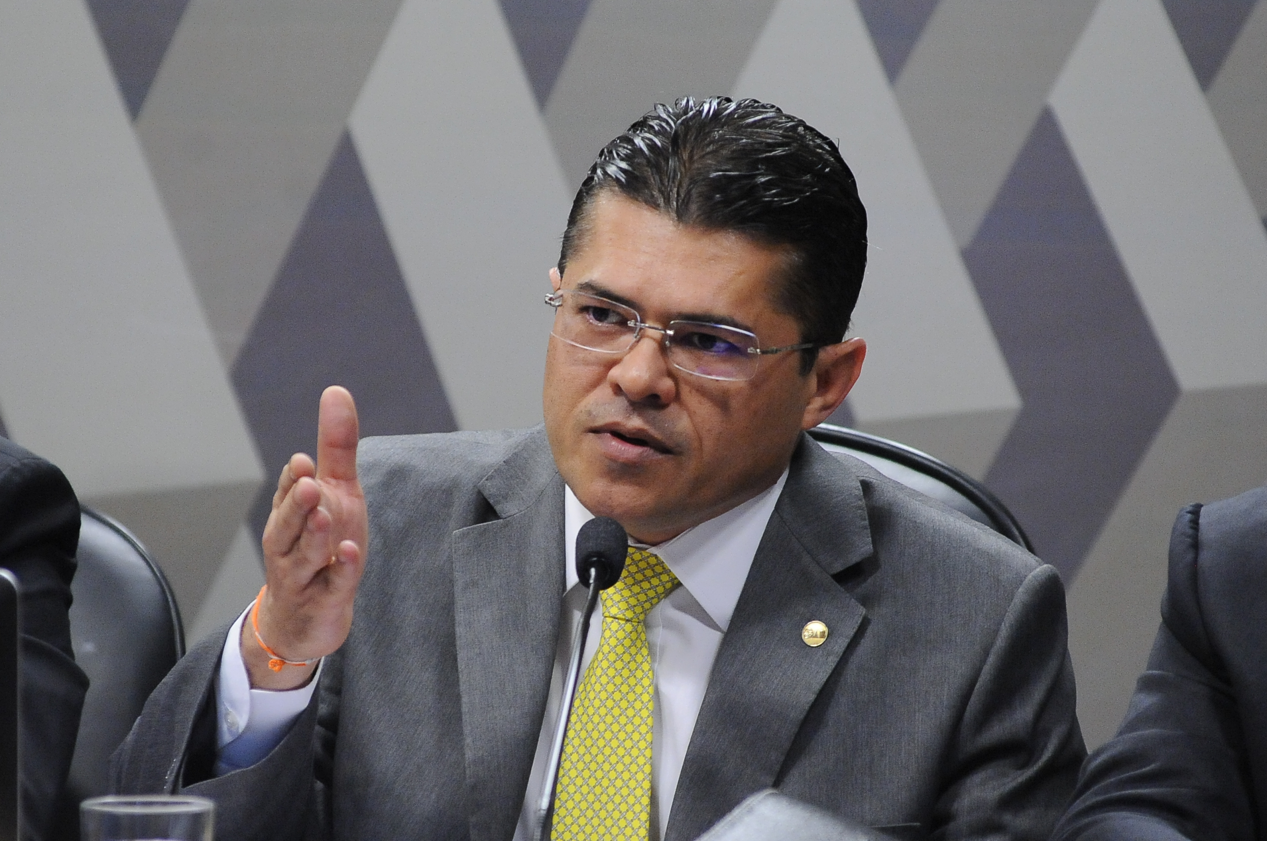 Comissão de Constituição, Justiça e Cidadania (CCJ) 1ª parte - Indicação de autoridades para compor o Conselho Nacional do Ministério Público (CNMP). Logo depois, deliberativa com 38 itens. Entre eles, a PEC 24/2012, que institui o Fundo Nacional de Desenvolvimento da Segurança Pública. Em pronunciamento, advogado Valdetário Andrade Monteiro. Foto: Pedro França/Agência Senado.